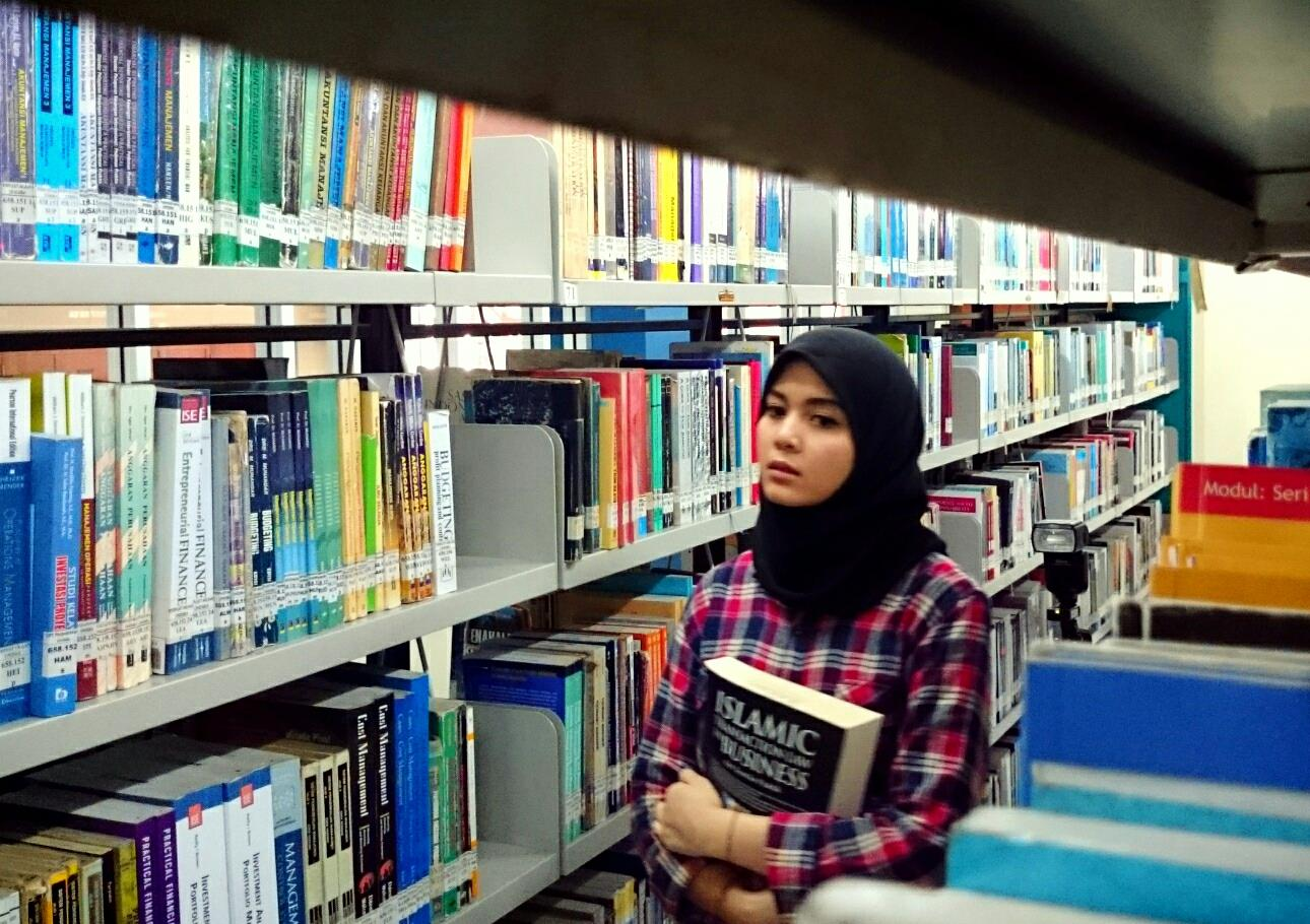 Perpustakaan UNISBA